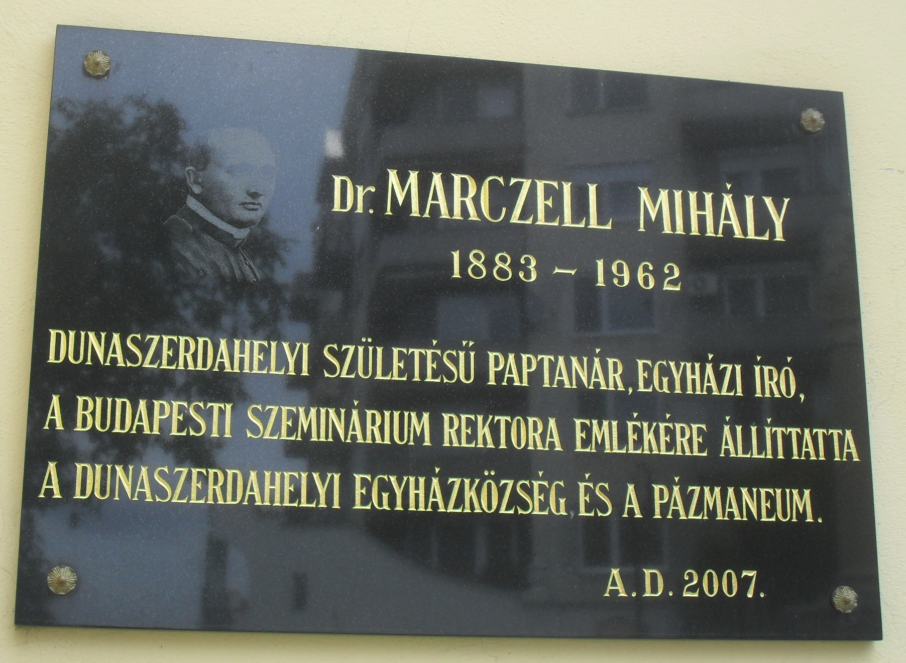 Dunaszerdahely - Marczell Mihály emléktáblája a katolikus templom falán